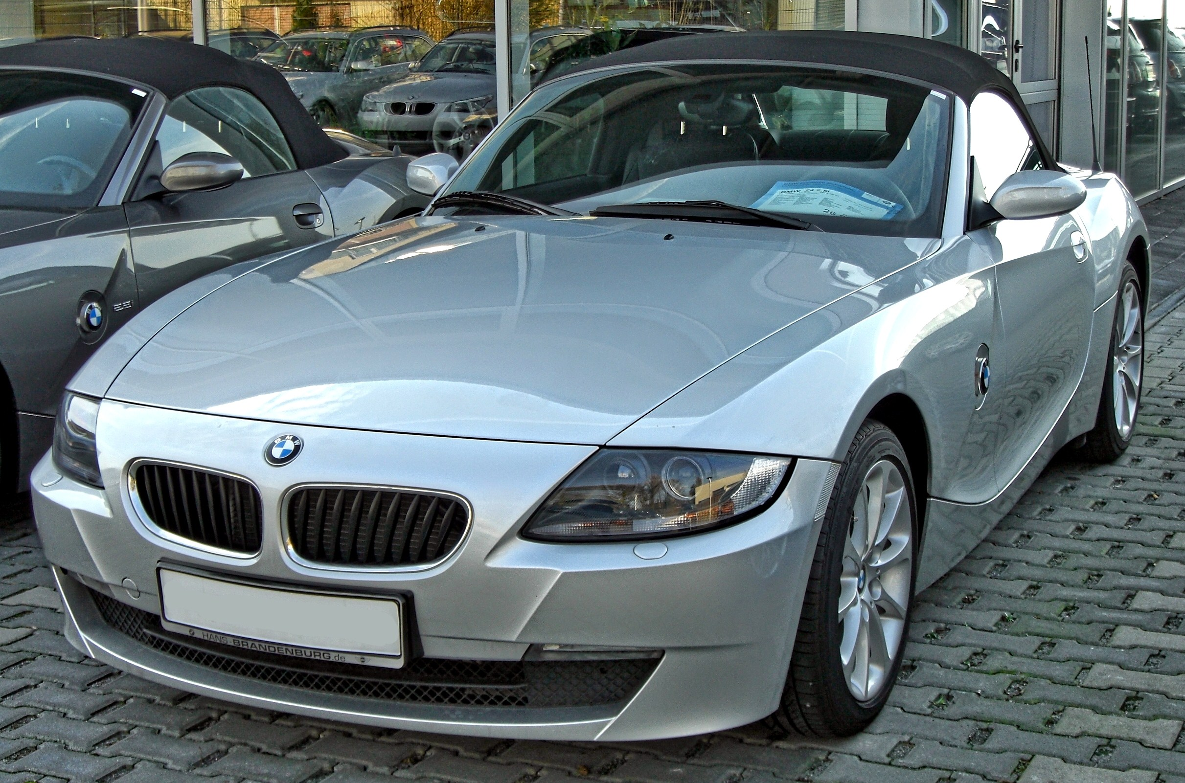 BMW Z4